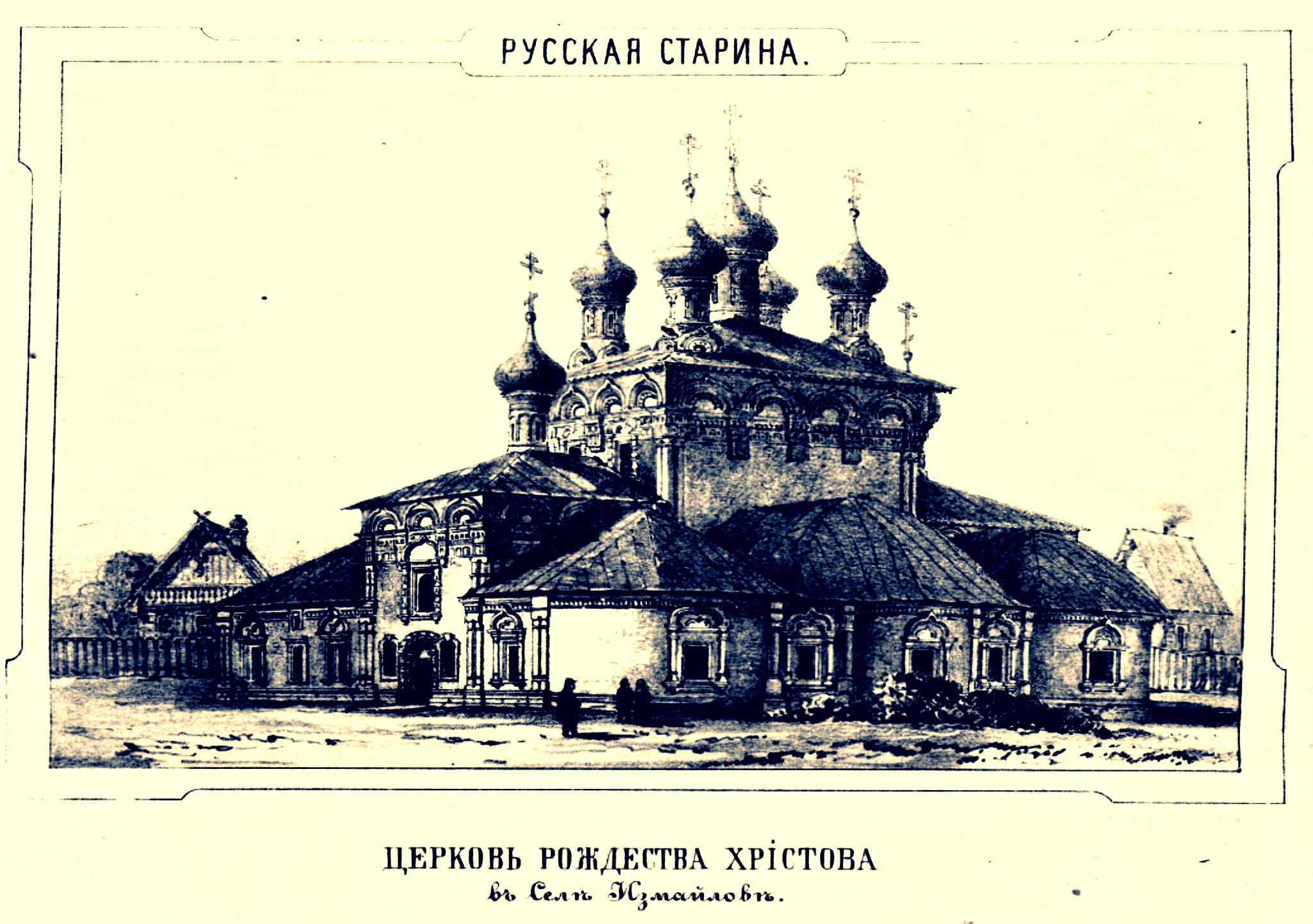 Измайловский дворец. Церковь Рождества Христова.